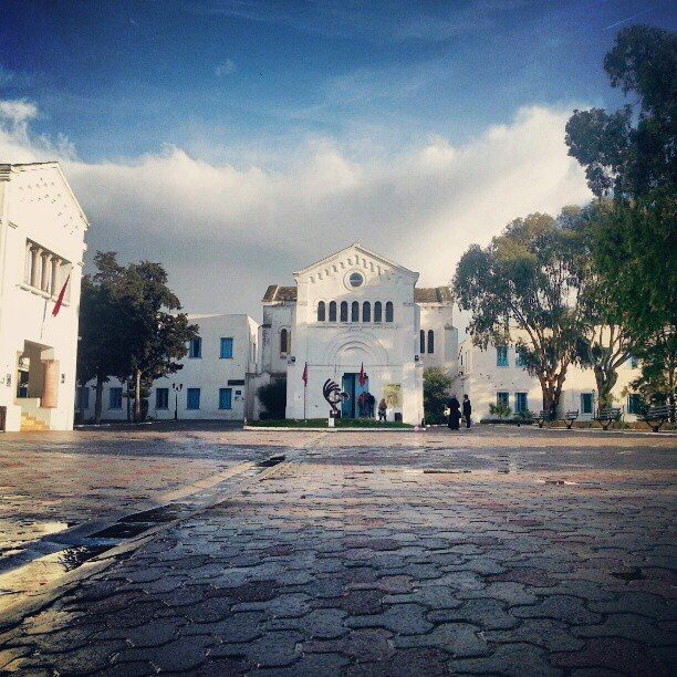 La cours principale de l'école avec la chapelle Sainte Monique qui date de IVe siècle